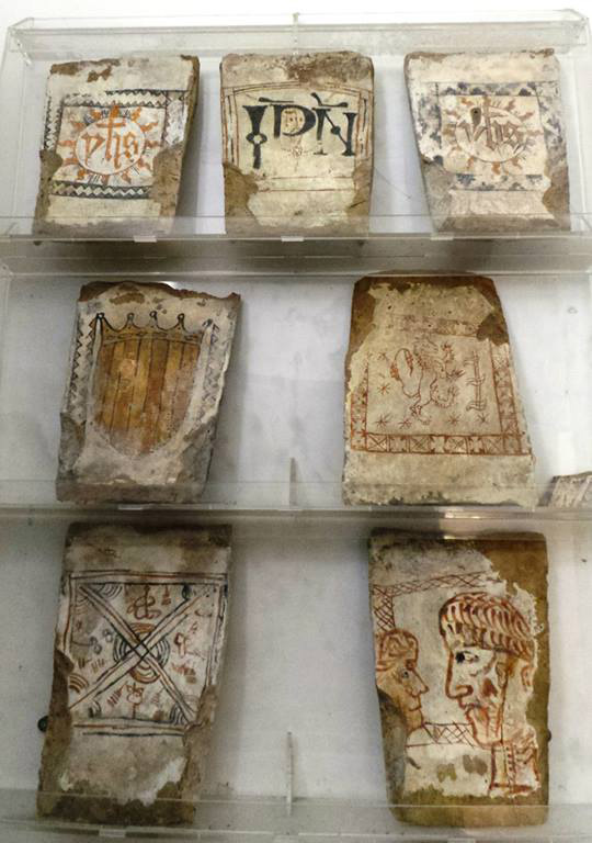 Le tegole del giardino della Minerva